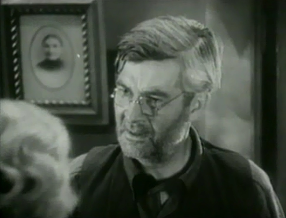 El actor estadounidense George Hayes en una escena de la película Jinetes del destino.